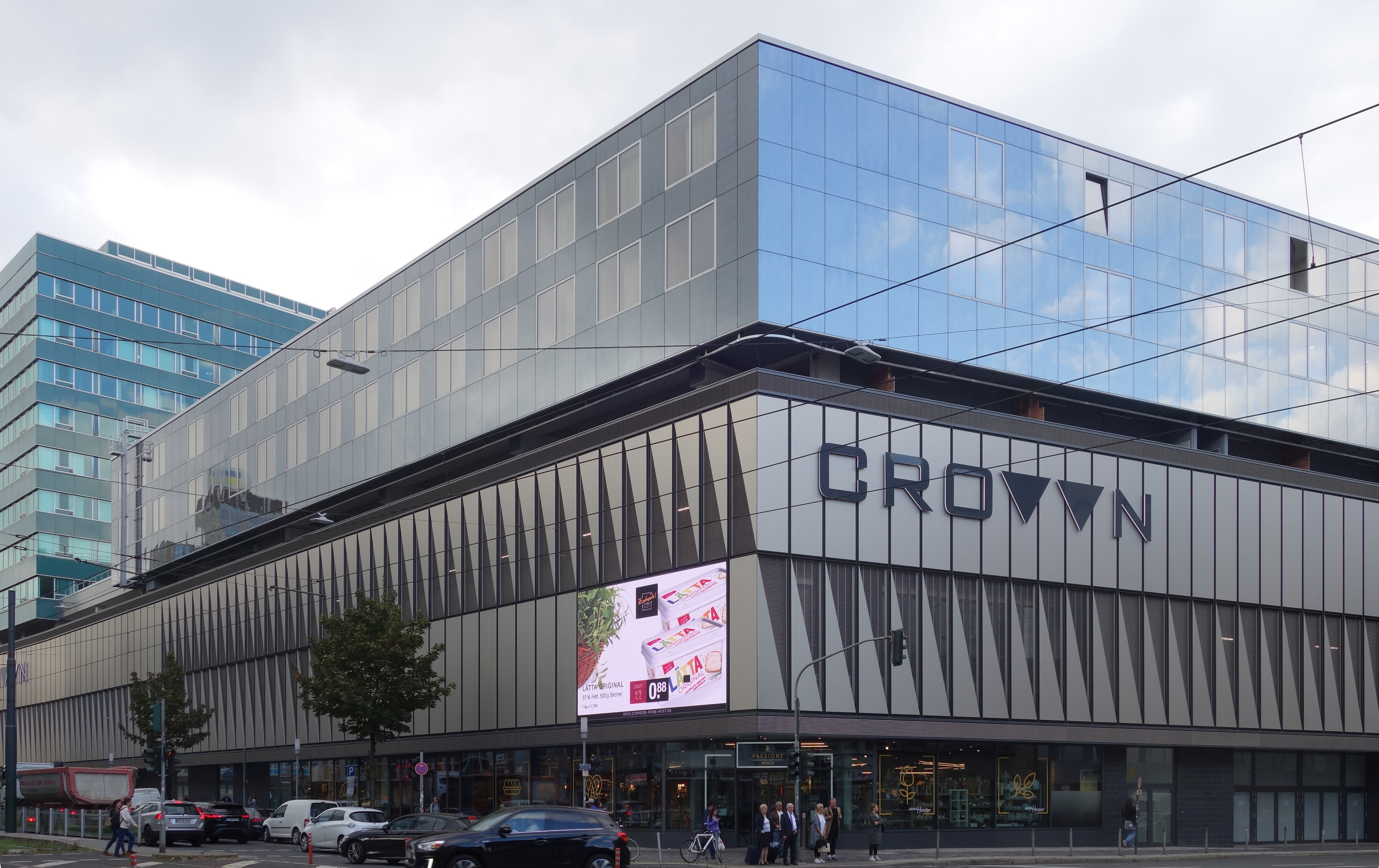 Düsseldorf, The Crown (Carat-Hotels), Edeka Zurheide.